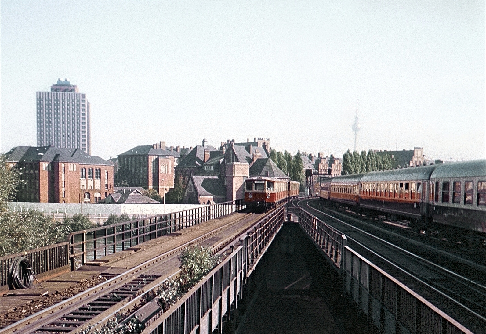 Lehrter Stadtbahnhof Osteinfahrt